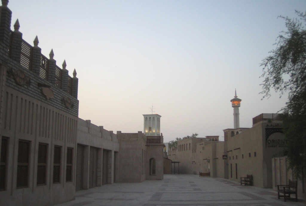 Al Bastakiya